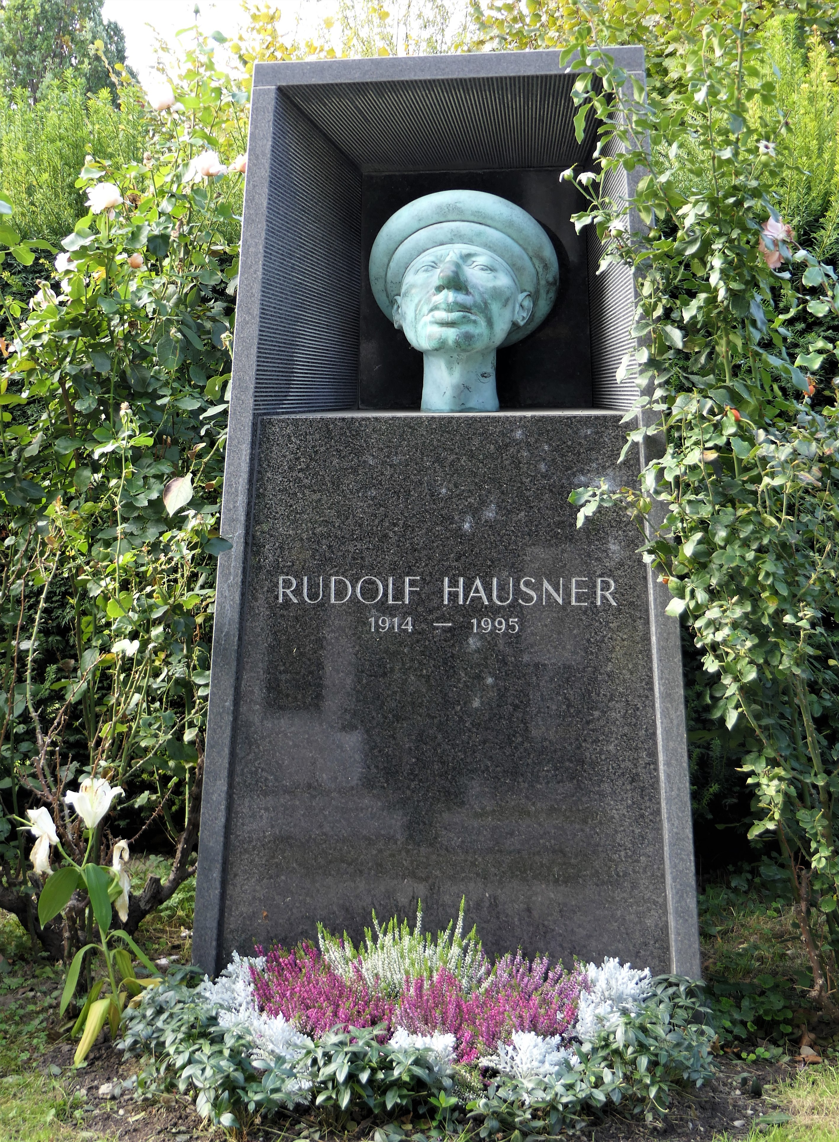 Grab von Rudolf Hausner auf dem Wiener Zentralfriedhof